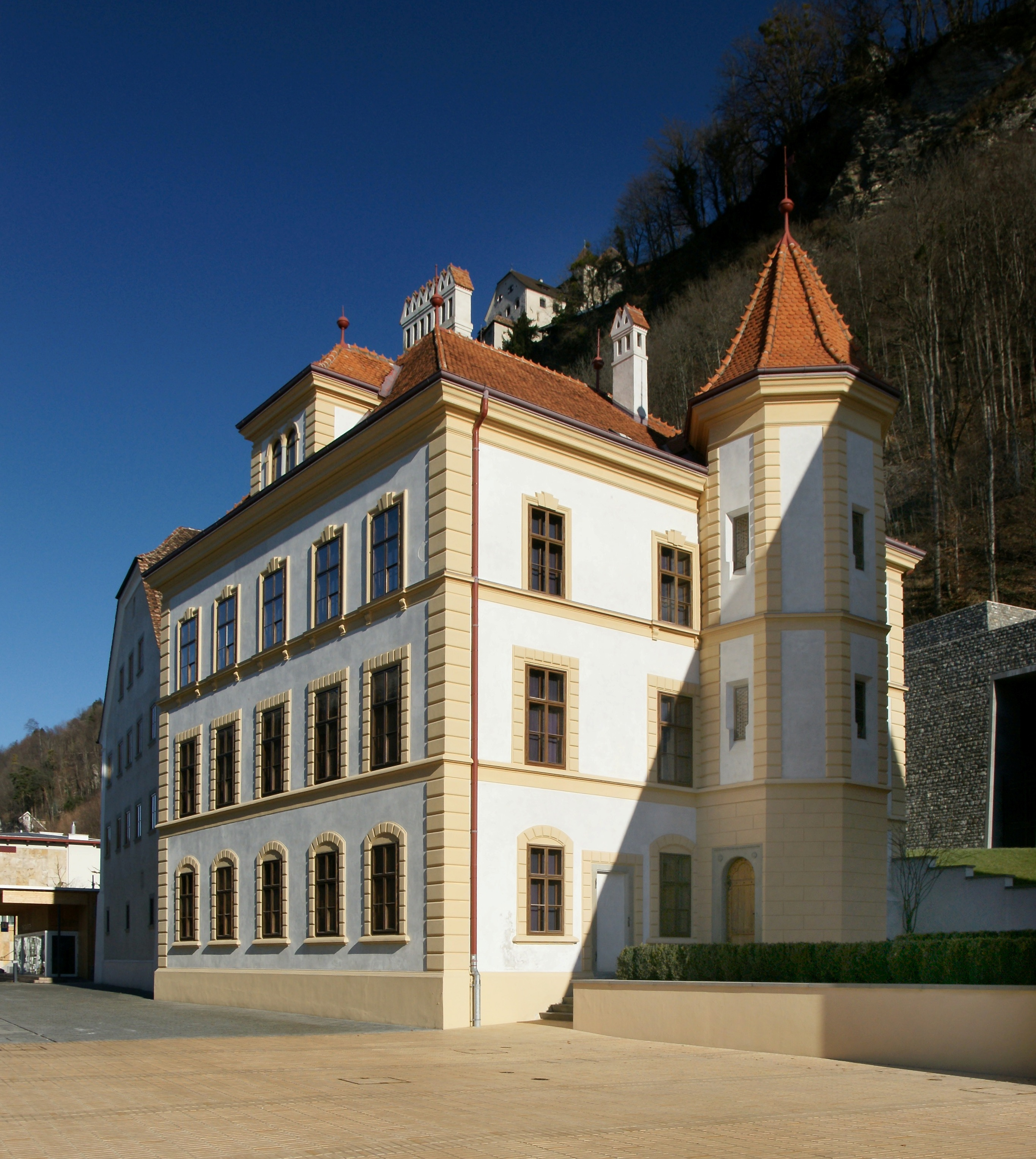 Das Gebäude der Liechtensteinischen Post AG mit der Philatelie in Vaduz.